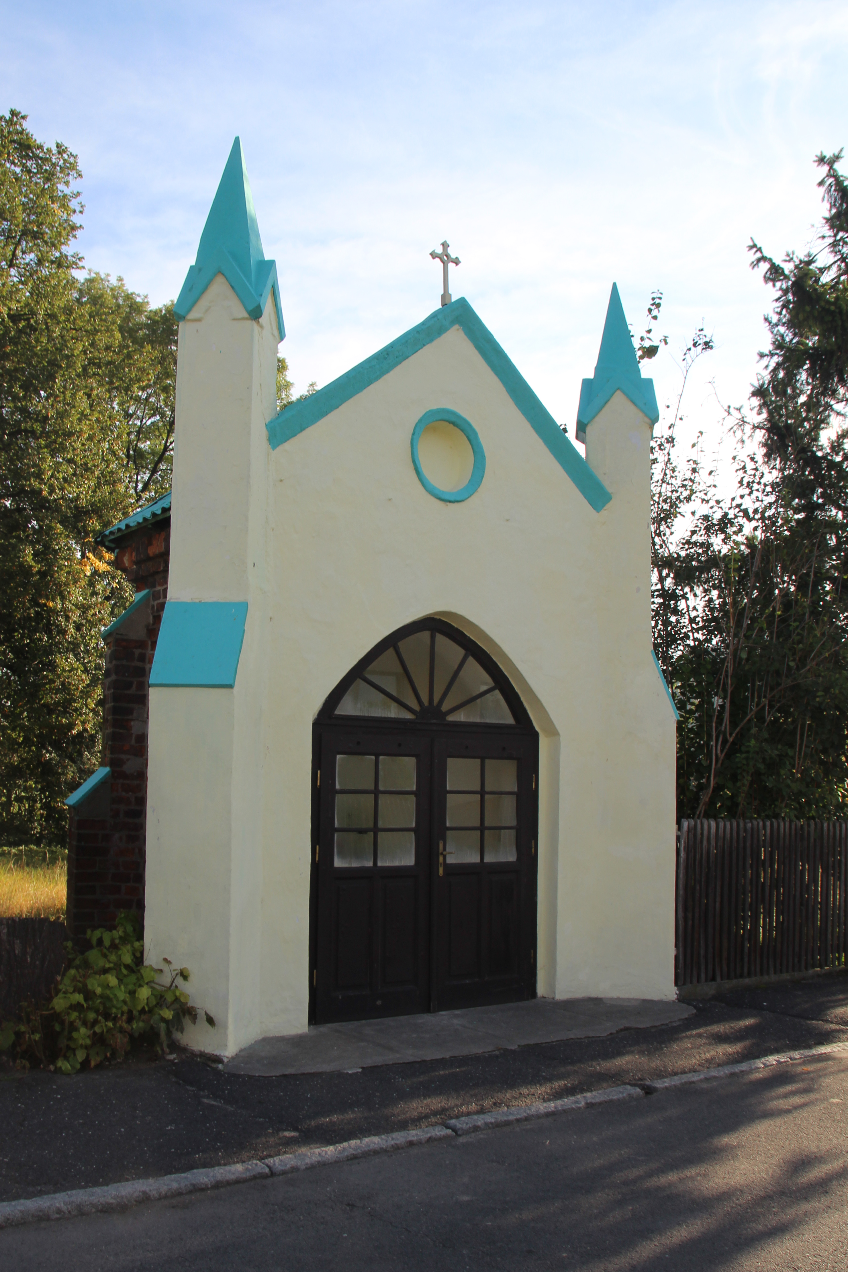 Gierałtowice (dodatkowa nazwa w j. niem. Klein Nimsdorf) – wieś w Polsce w województwie opolskim, w powiecie kędzierzyńsko-kozielskim, w gminie Reńska Wieś.